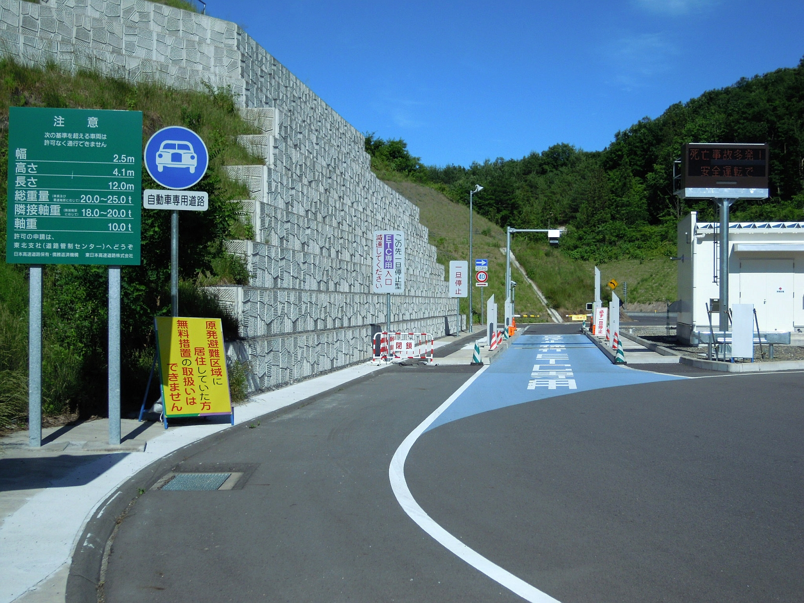 福島県白河市にある東北自動車道白河中央スマートインターチェンジ料金所（上り線側）を一般道側から。